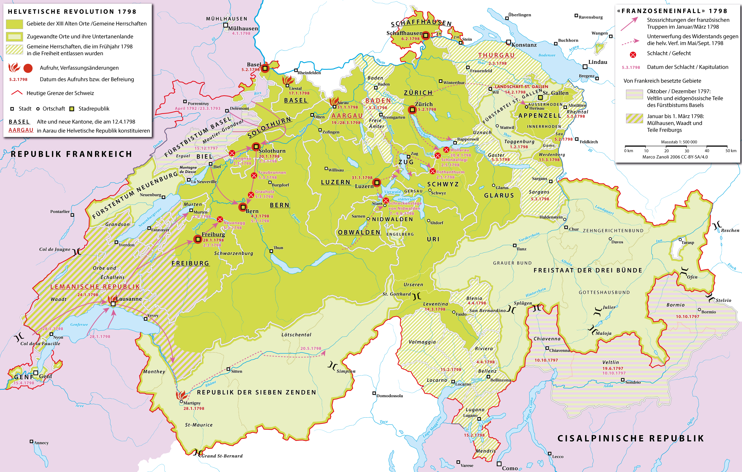 Karte zur Helvetischen Revolution und zum Franzoseneinfall in der Schweiz 1797/98